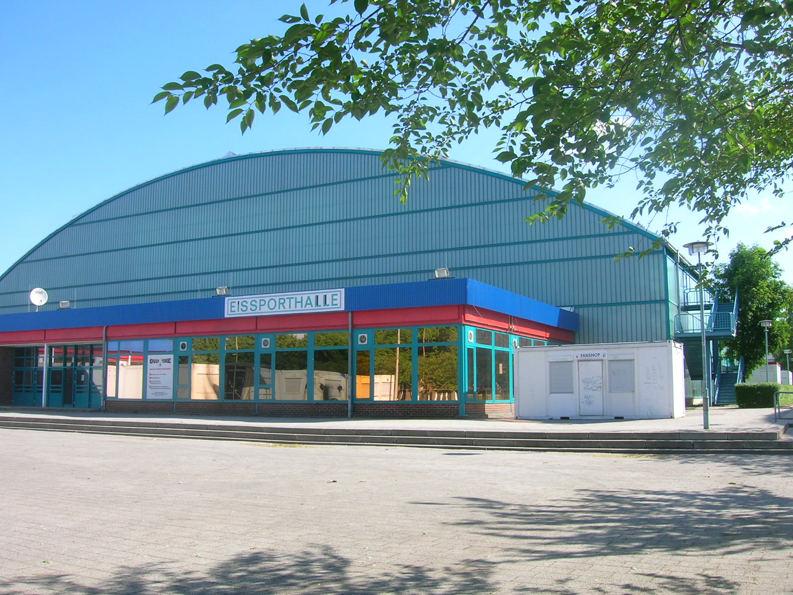 Sportforum Berlin in Berlin-Hohenschönhausen, Eissporthalle Wellblechpalast